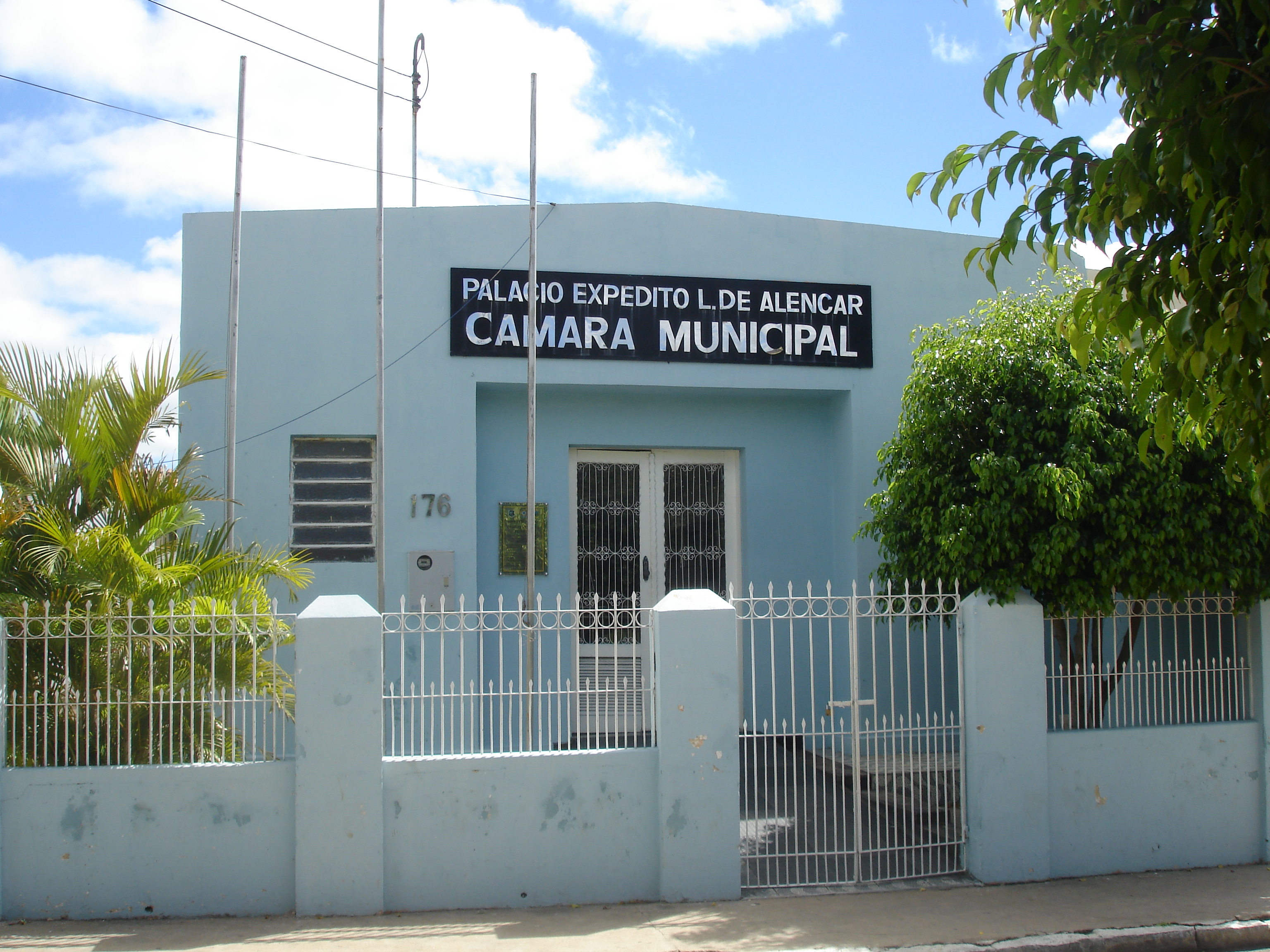 Poder Legislativo de Potengi - Câmara Municipal